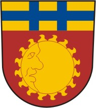 Ohnišov /okres Rychnov nad Kněžnou/